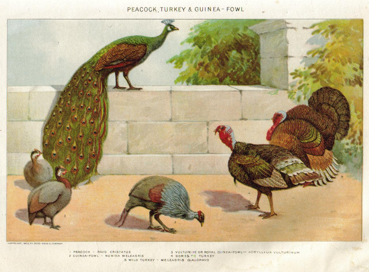 Painting